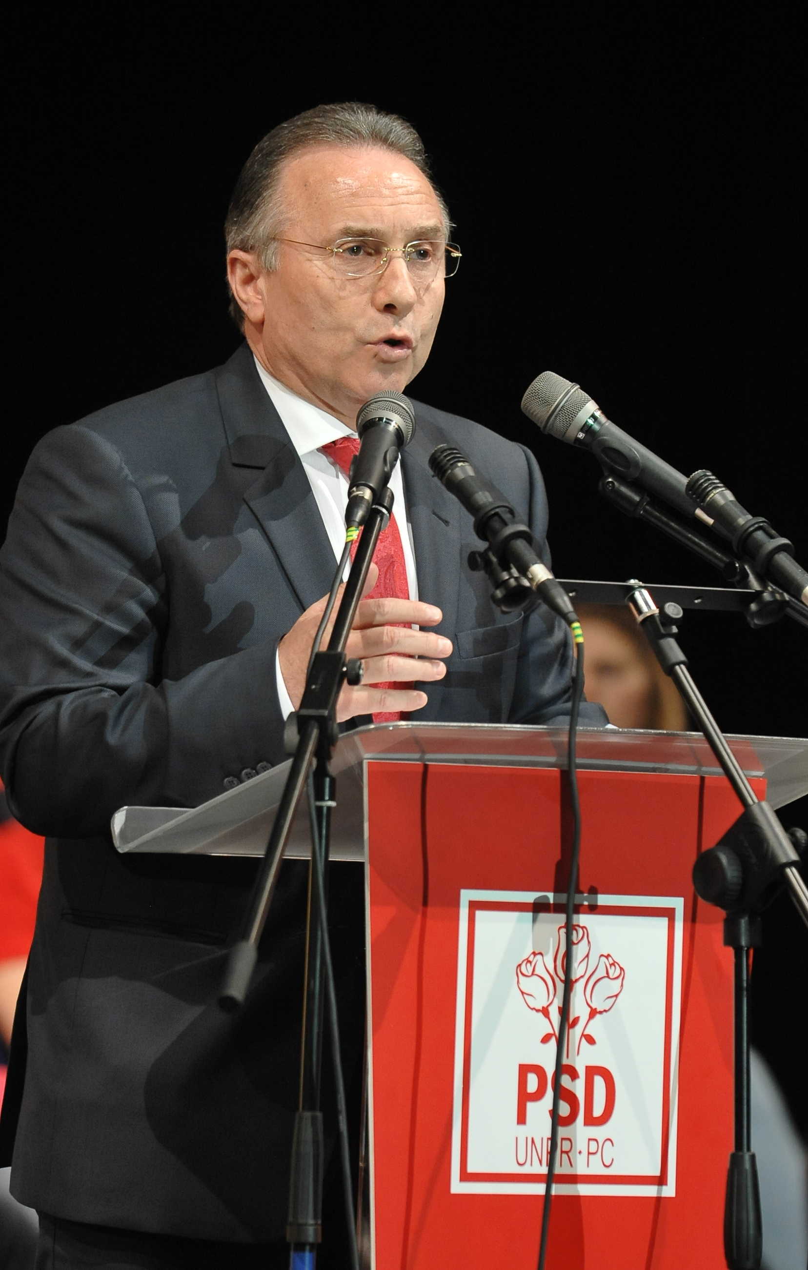 Mitingul Aliantei PSD-UNPR-PC, Bacau - 29 (2)